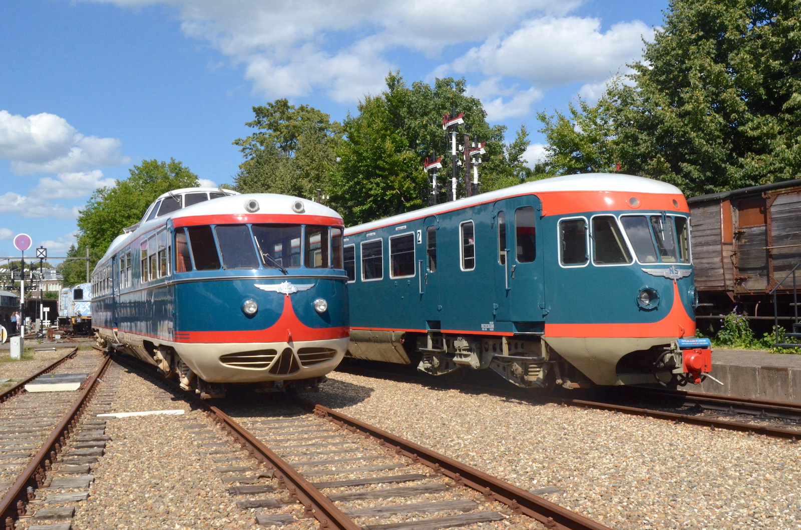 Nederlands Spoorwegmuseum NS DE 20 en 41. Foto: Erik Swierstra.